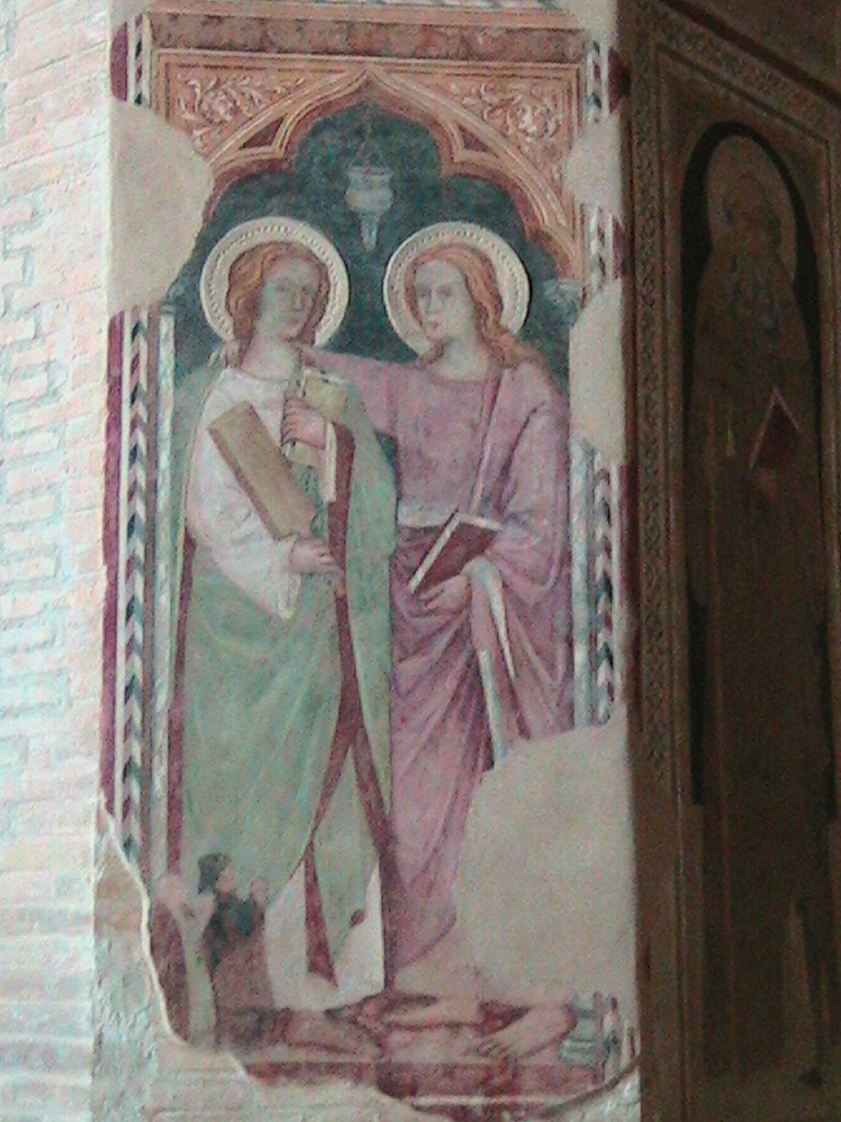 Atri- Cattedrale di Santa Maria Assunta - Affreschi dell'interno